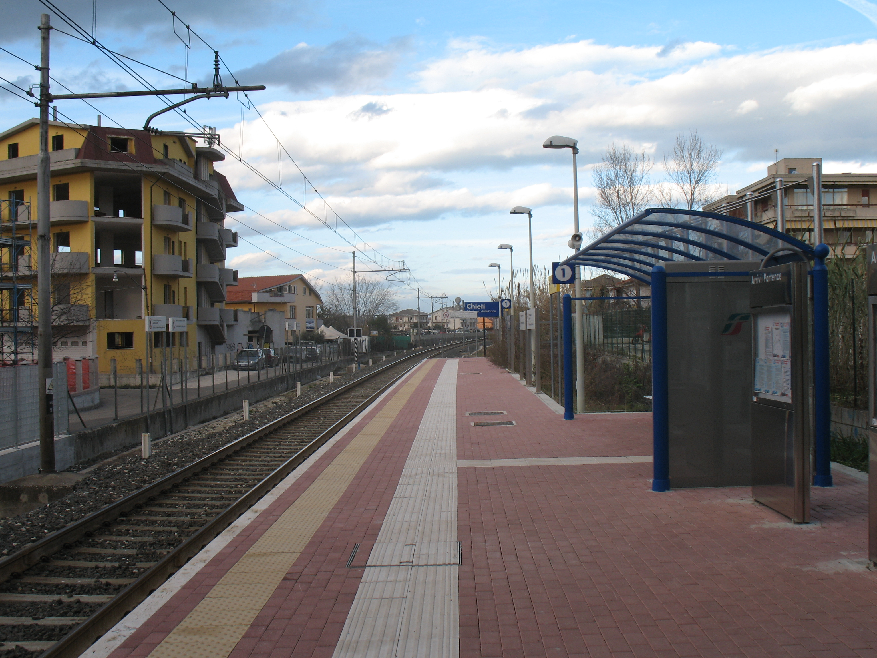 Binario e panchine per viaggiatori della fermata ferroviaria di Madonna delle Piane, frazione di Chieti